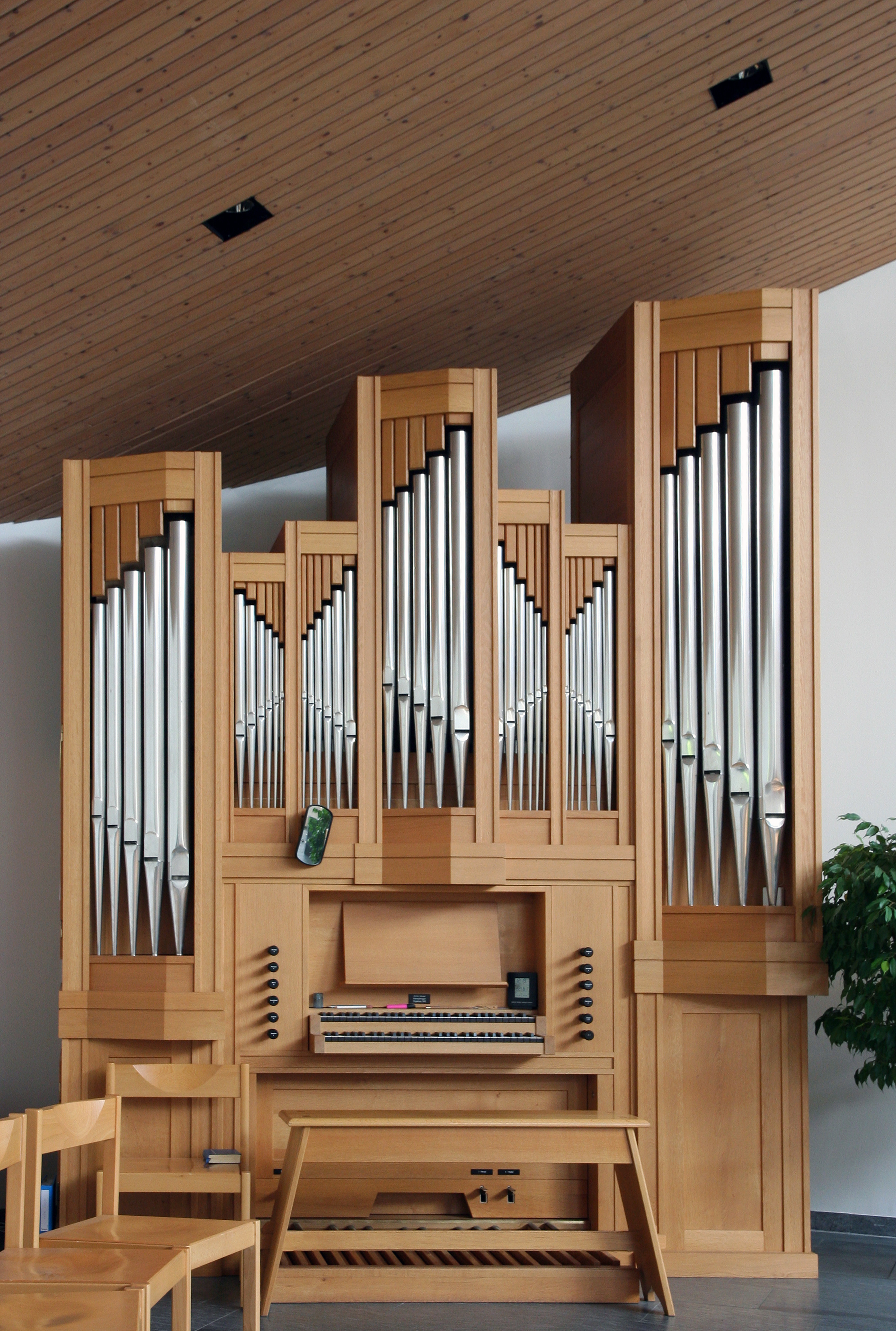 Römisch-katholische Kirche St. Antonius in Hirzel ZH, Orgel